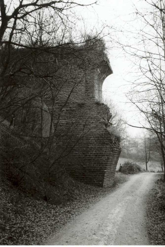 Überrest einer zerstörten Brücke der Vennbahn an der deutsch-belgischen Grenze, eigenes Bild, GNU FDL